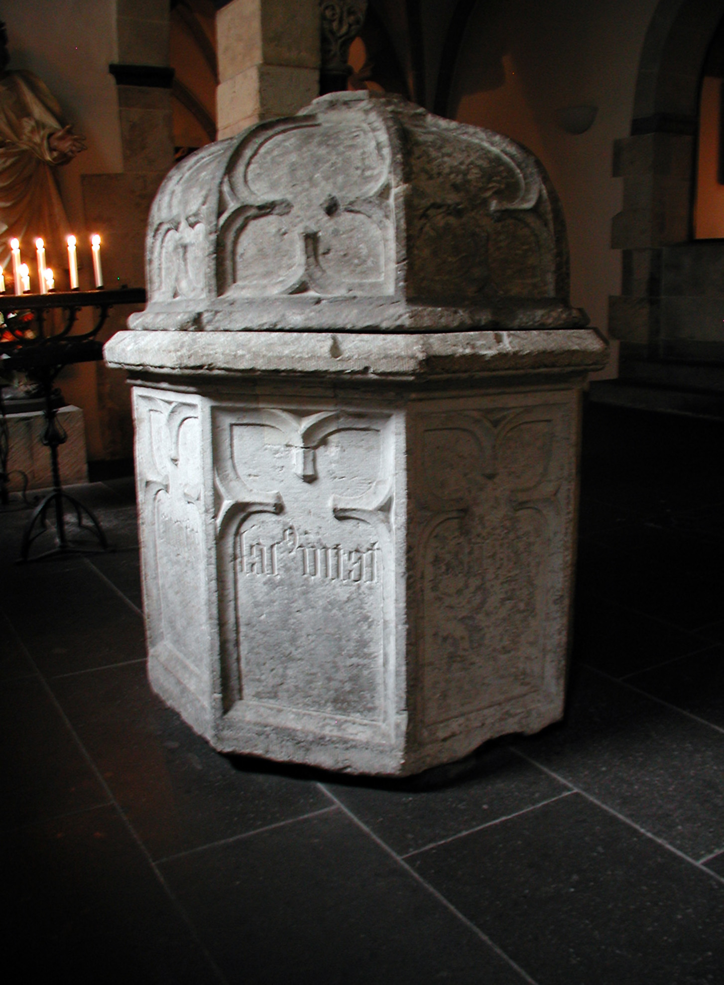 Köln, St. Andreas Taufbecken vor Fresko